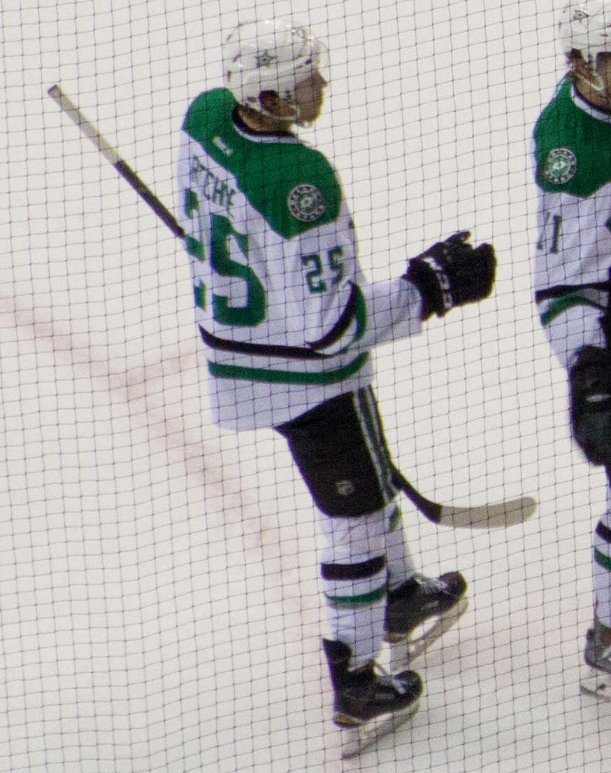 Capitals 1 / Dallas Stars 4